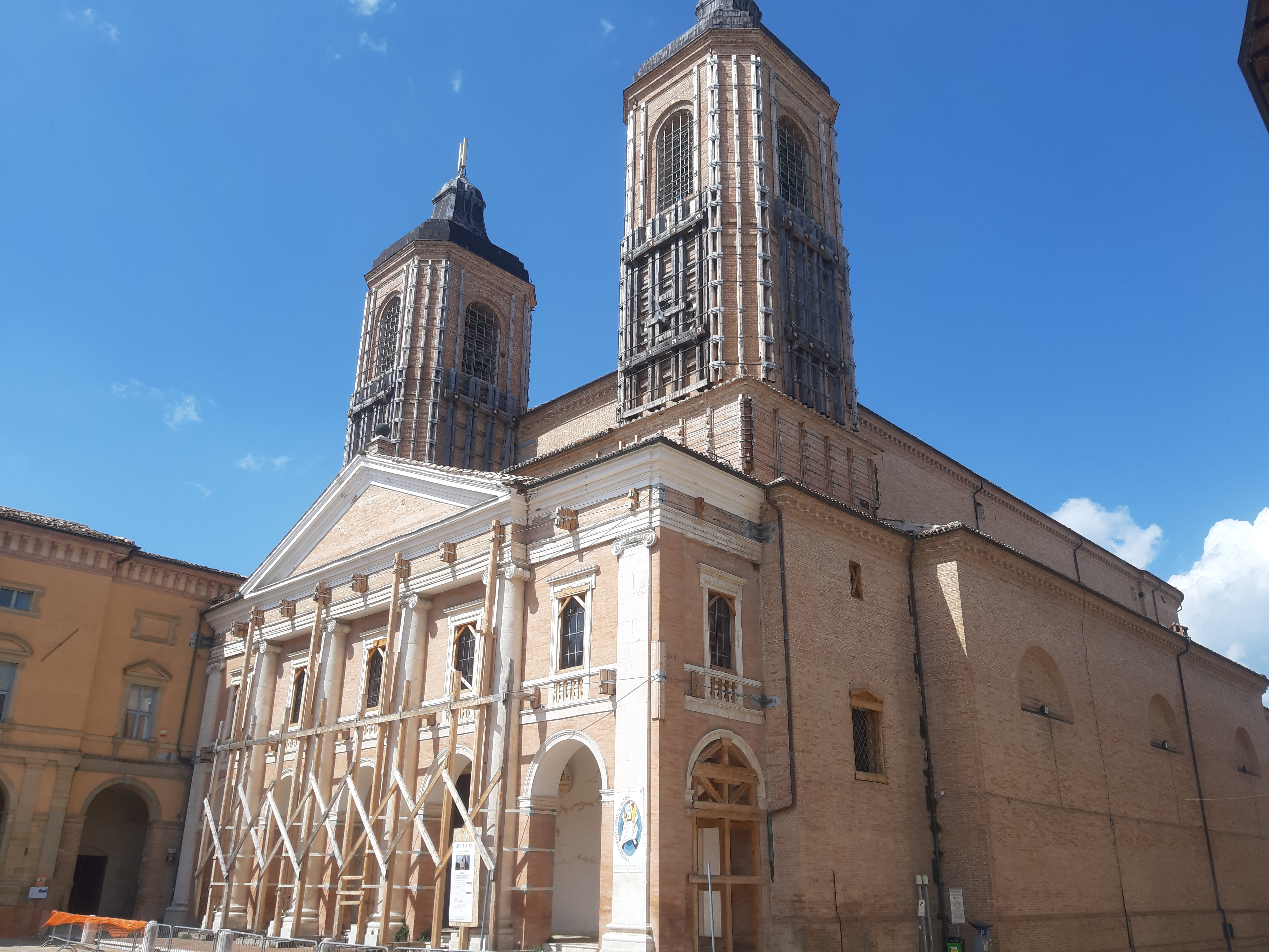 basilica con ponteggi dopo terremoto 2016